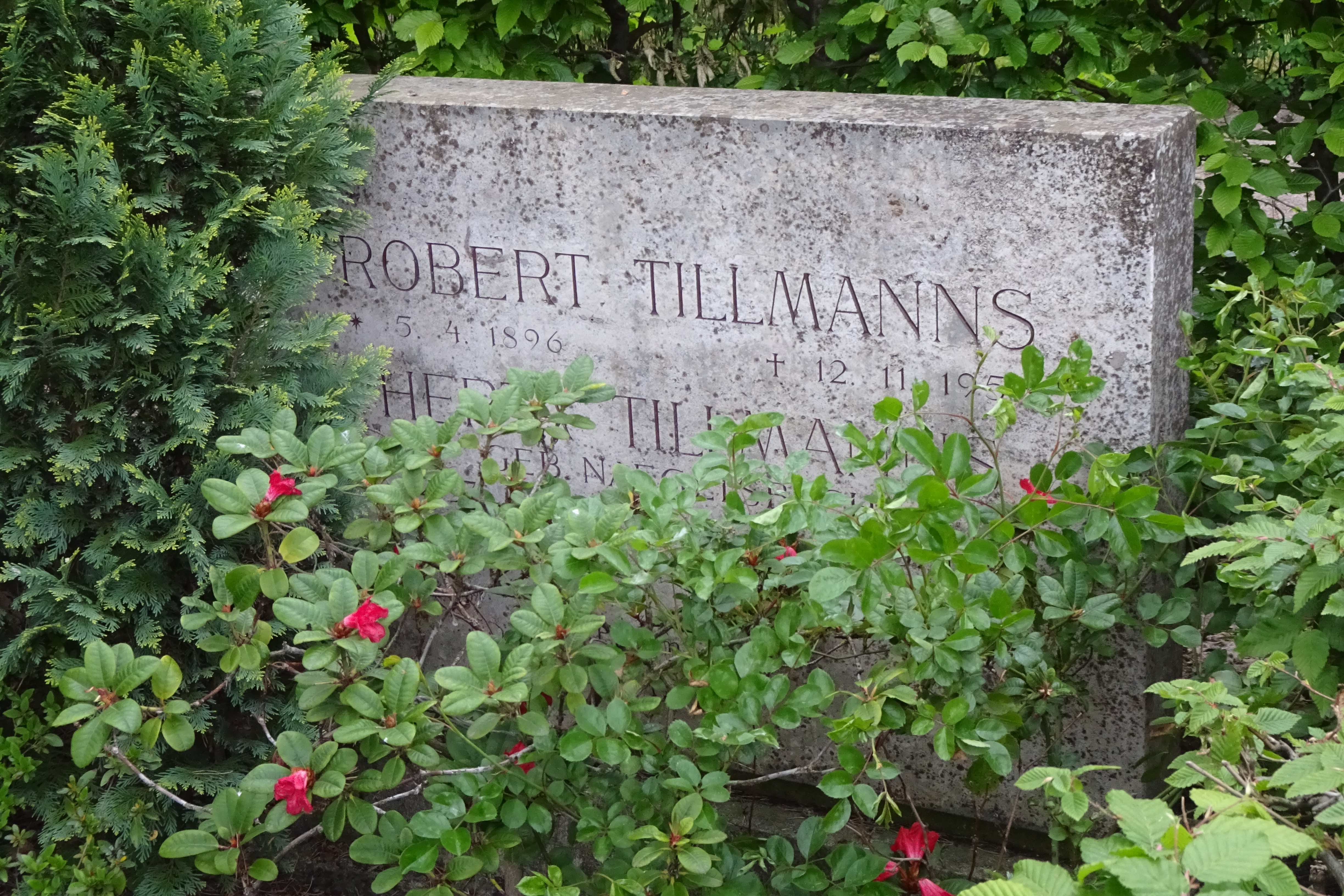 Grab des Politikers Robert Tillmanns auf dem Friedhof Nikolassee in Berlin-Nikolassee.